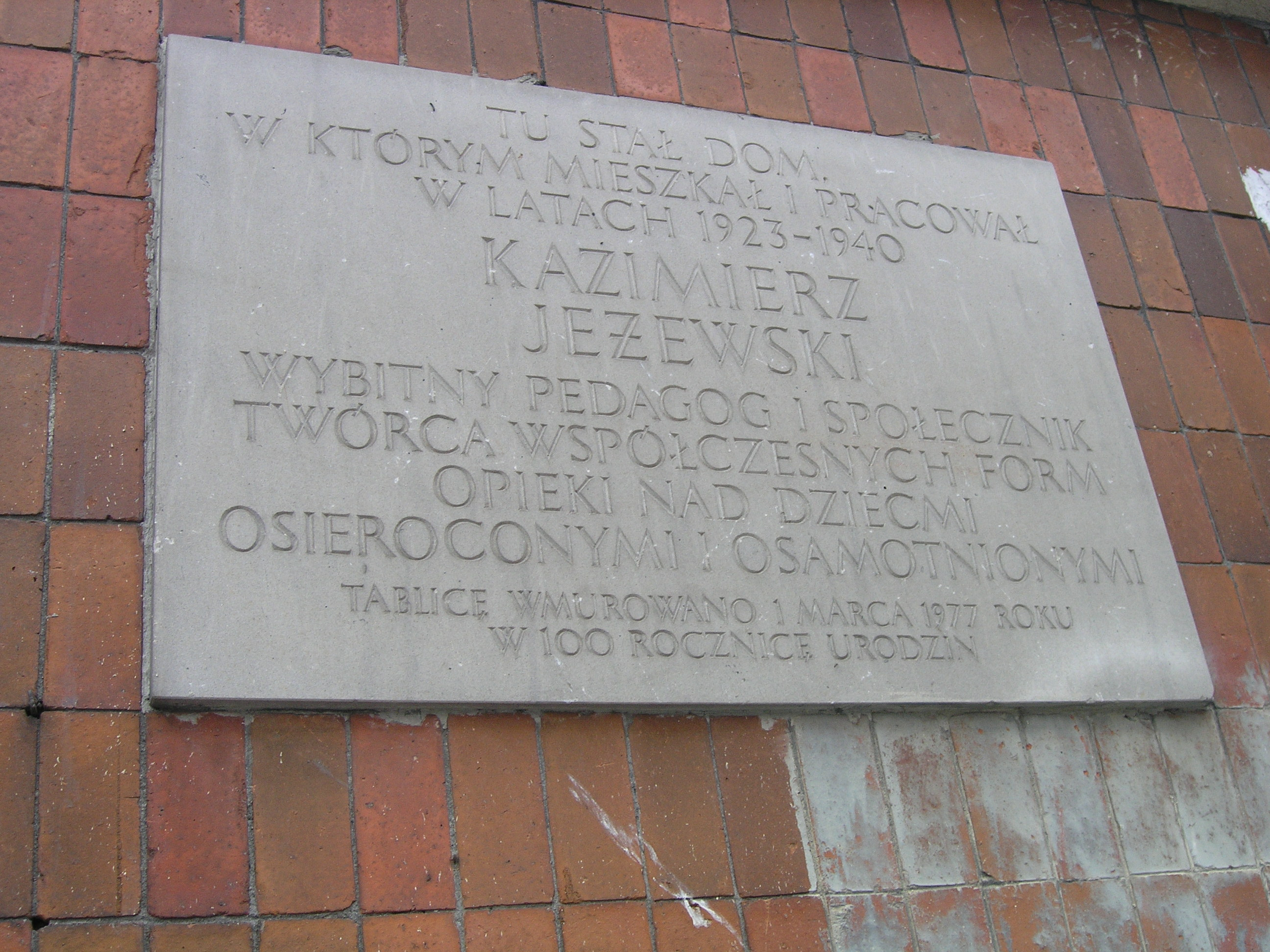 Tablica upamiętniająca pedagoga Kazimierza Jeżewskiego na bloku przy al. Solidarności 83 w Warszawie